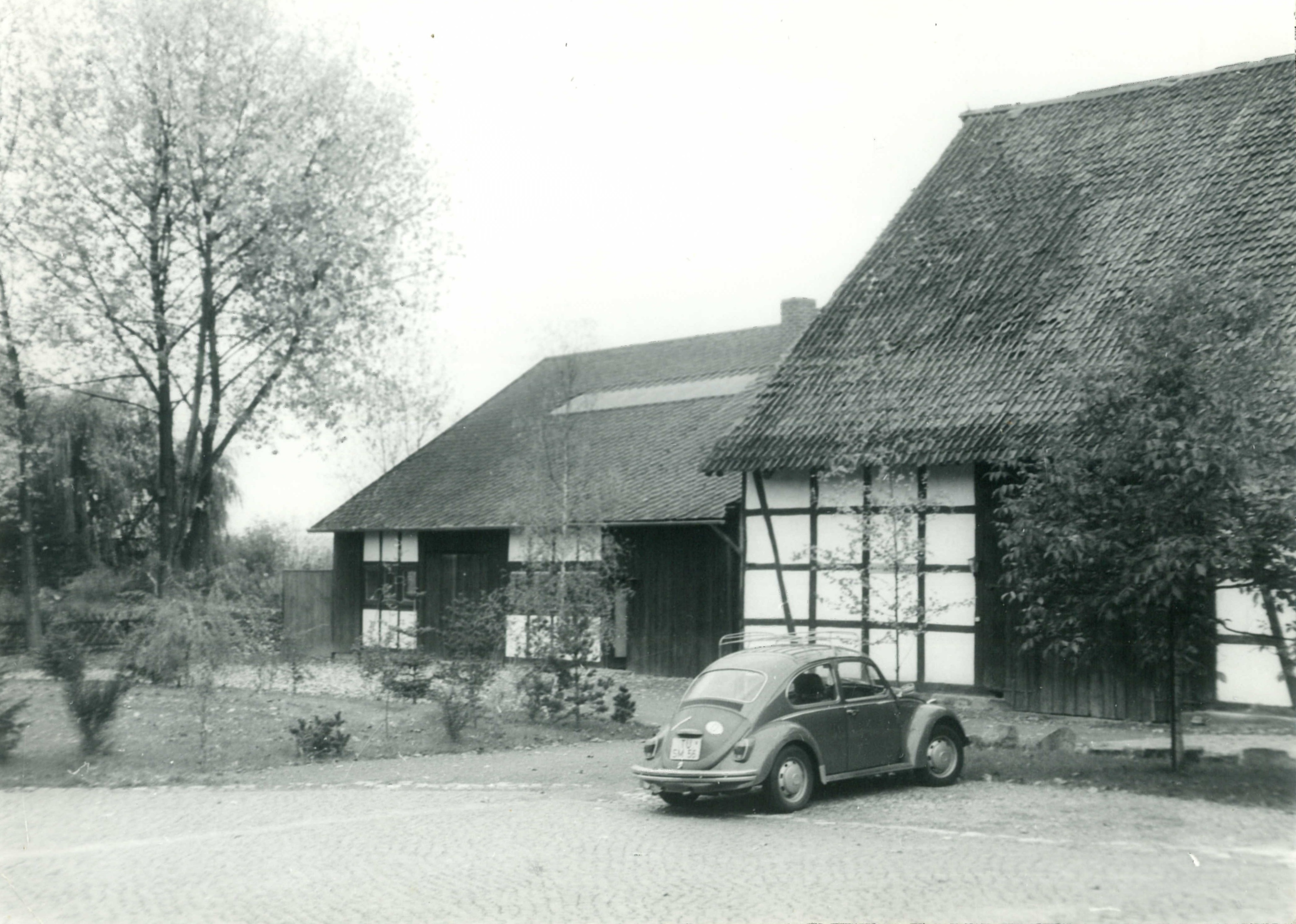 Rudolf Janke Orgelbauwerkstatt außen